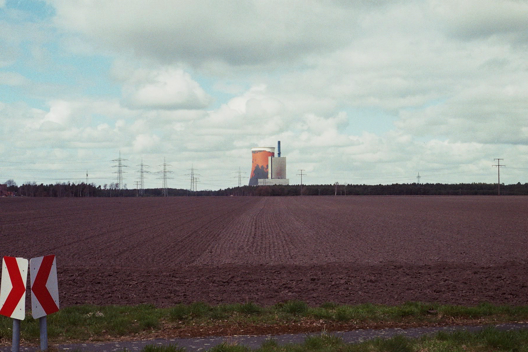 Emsland, Kraftwerk Meppen-Hüntel